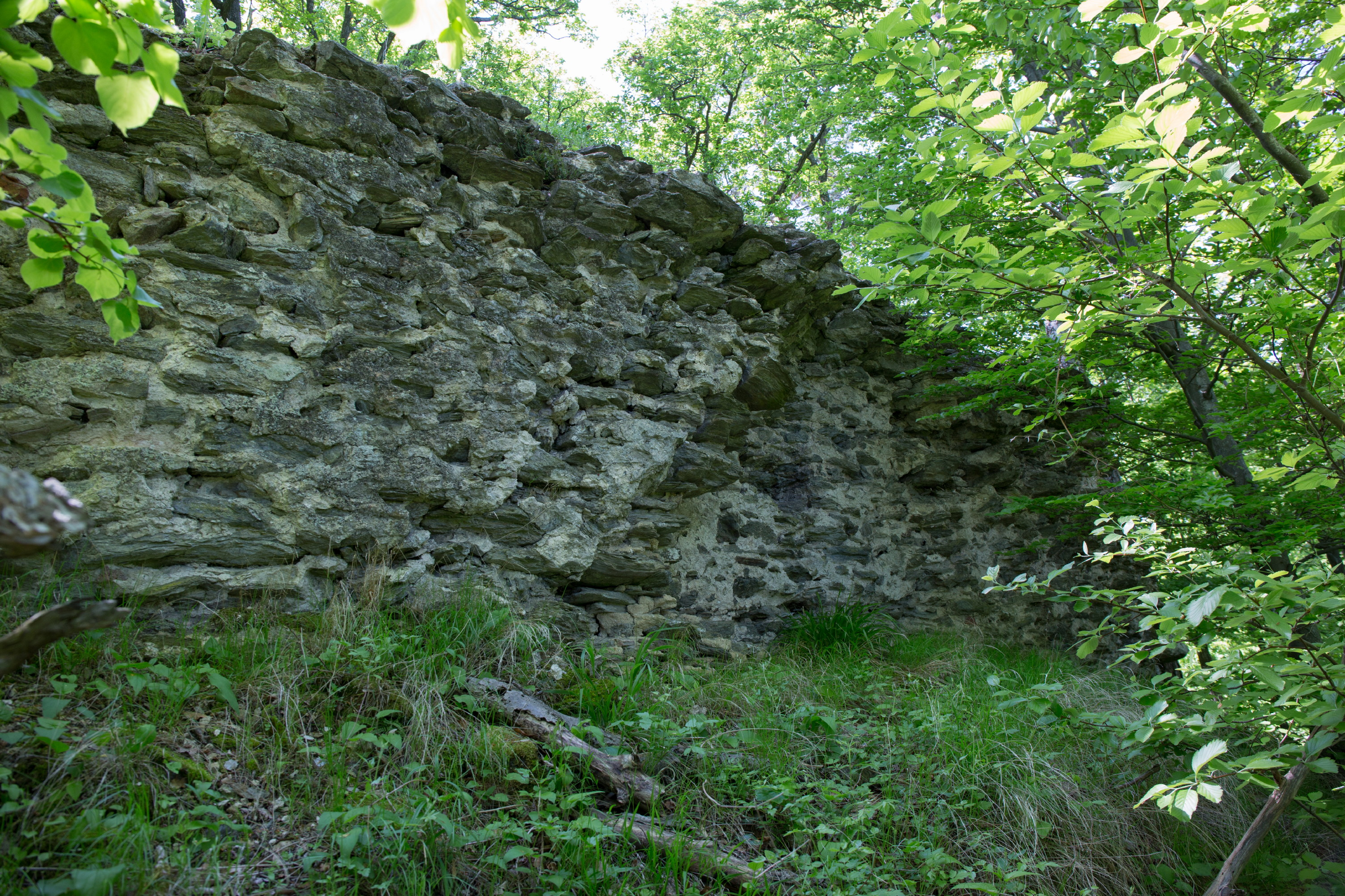 Burgruine, Hausberg, Ödes Schloss